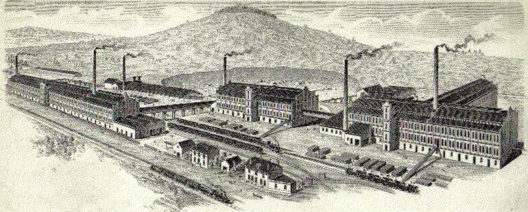 Ziegelfabrik Jeandelaincourt, Frankreich